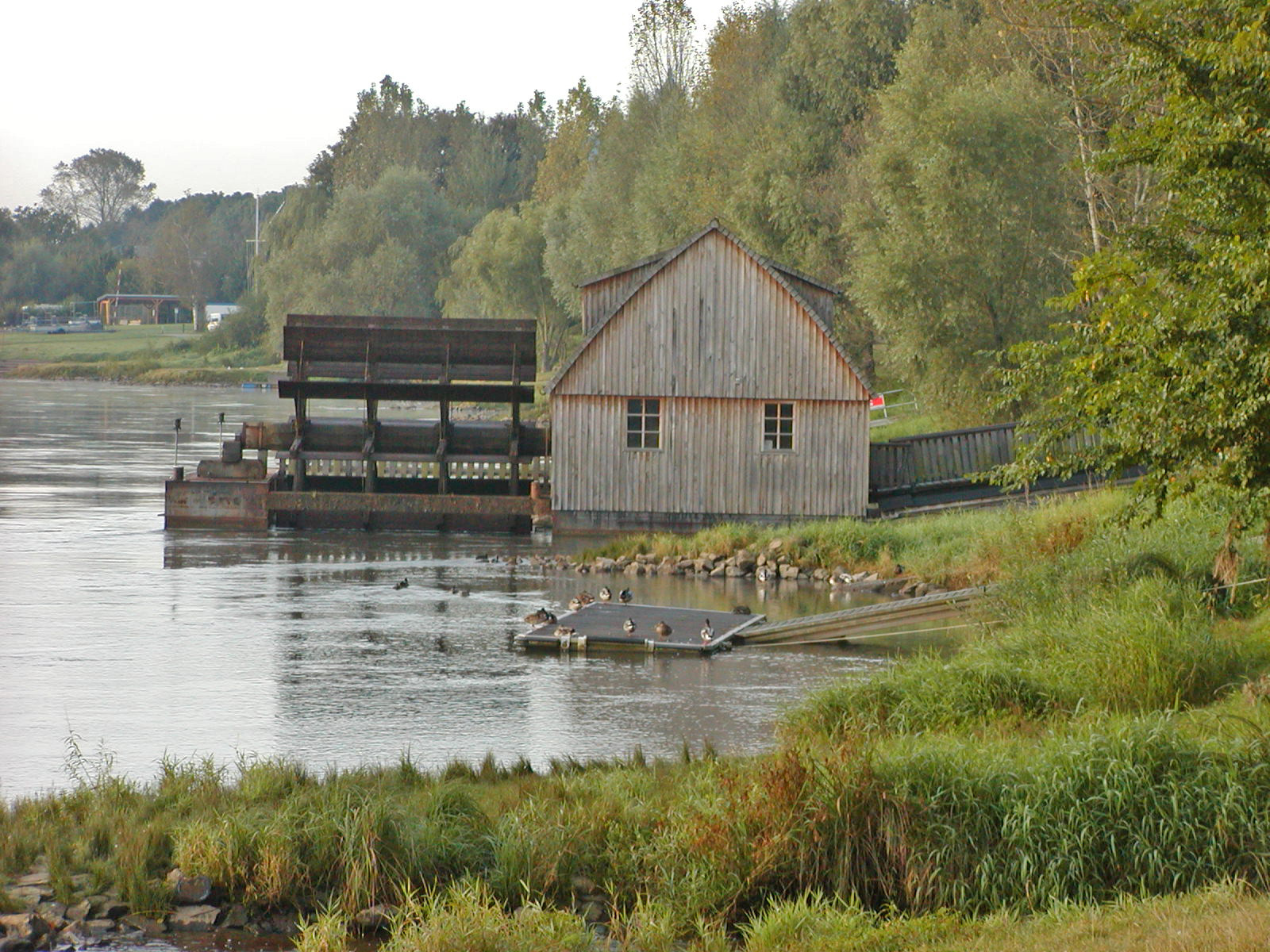 Südansicht der Schiffsmühle auf der Weser bei Minden, Nordrhein-Westfalen. Die Mühle ist Teil der Westfälischen Mühlenstraße.